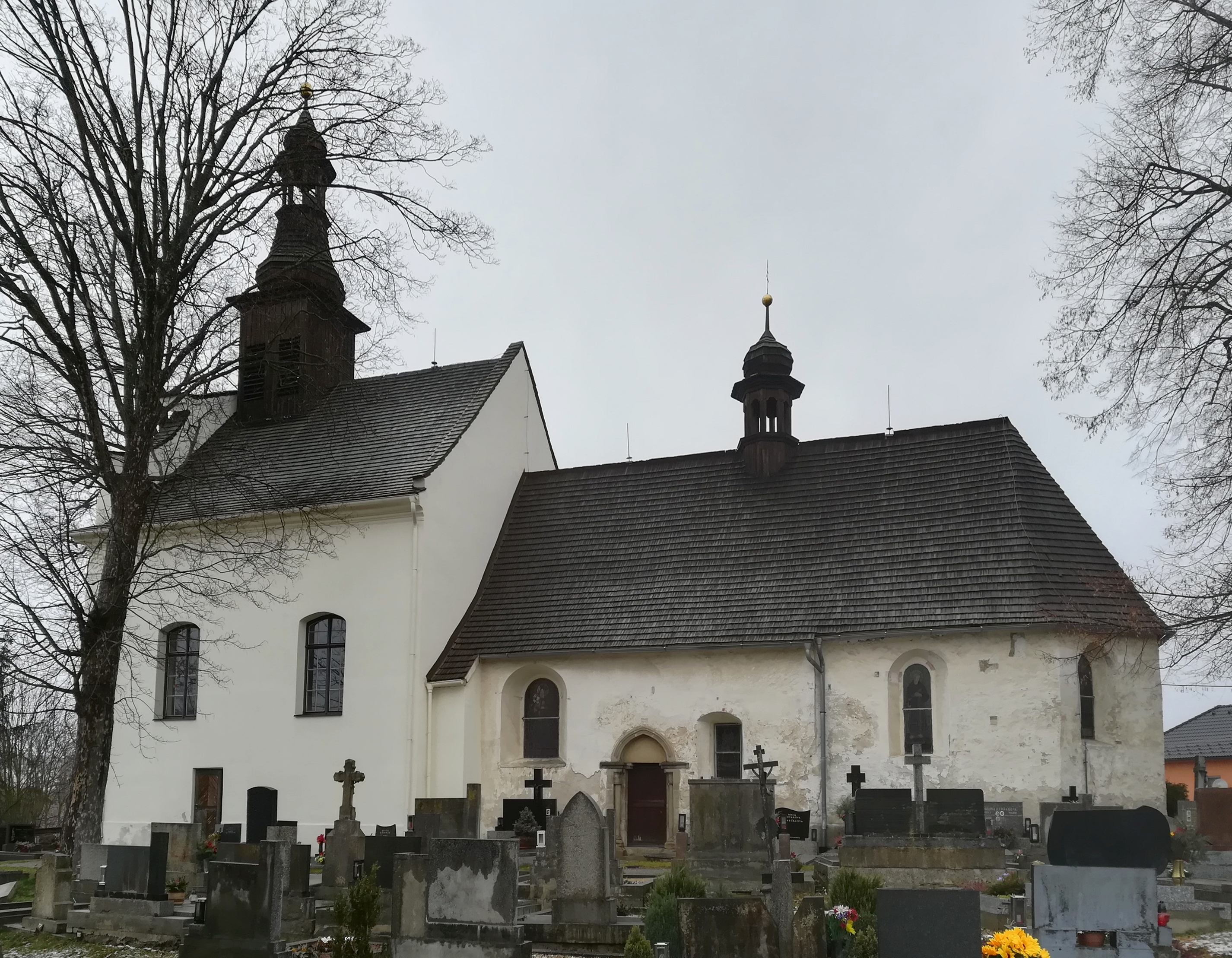 Kostelec (okres Jihlava) - kostel svaté Kunhuty, pohled od jihu